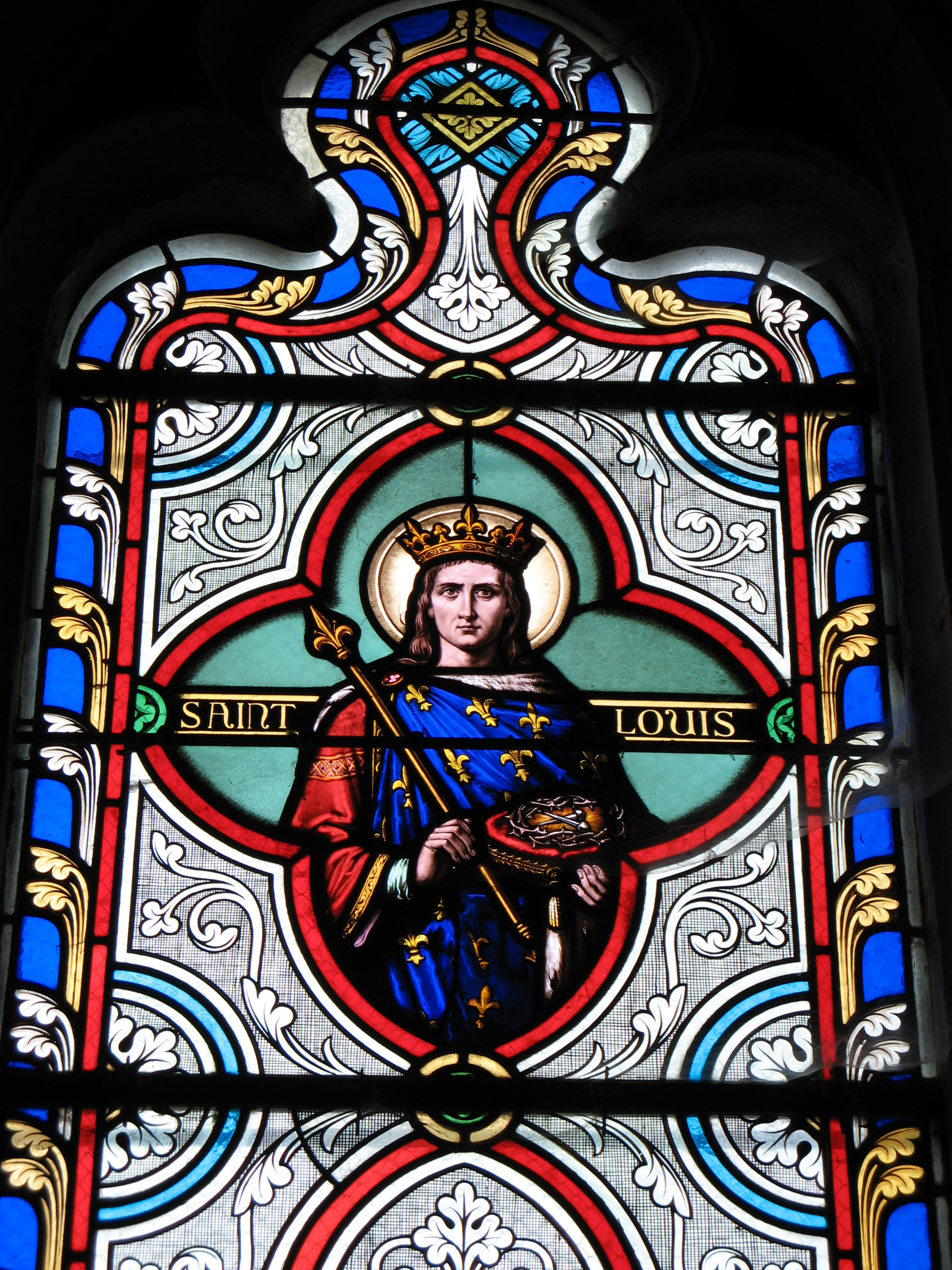 vitrail de l'église Notre Dame de Lye. Saint-Louis. .